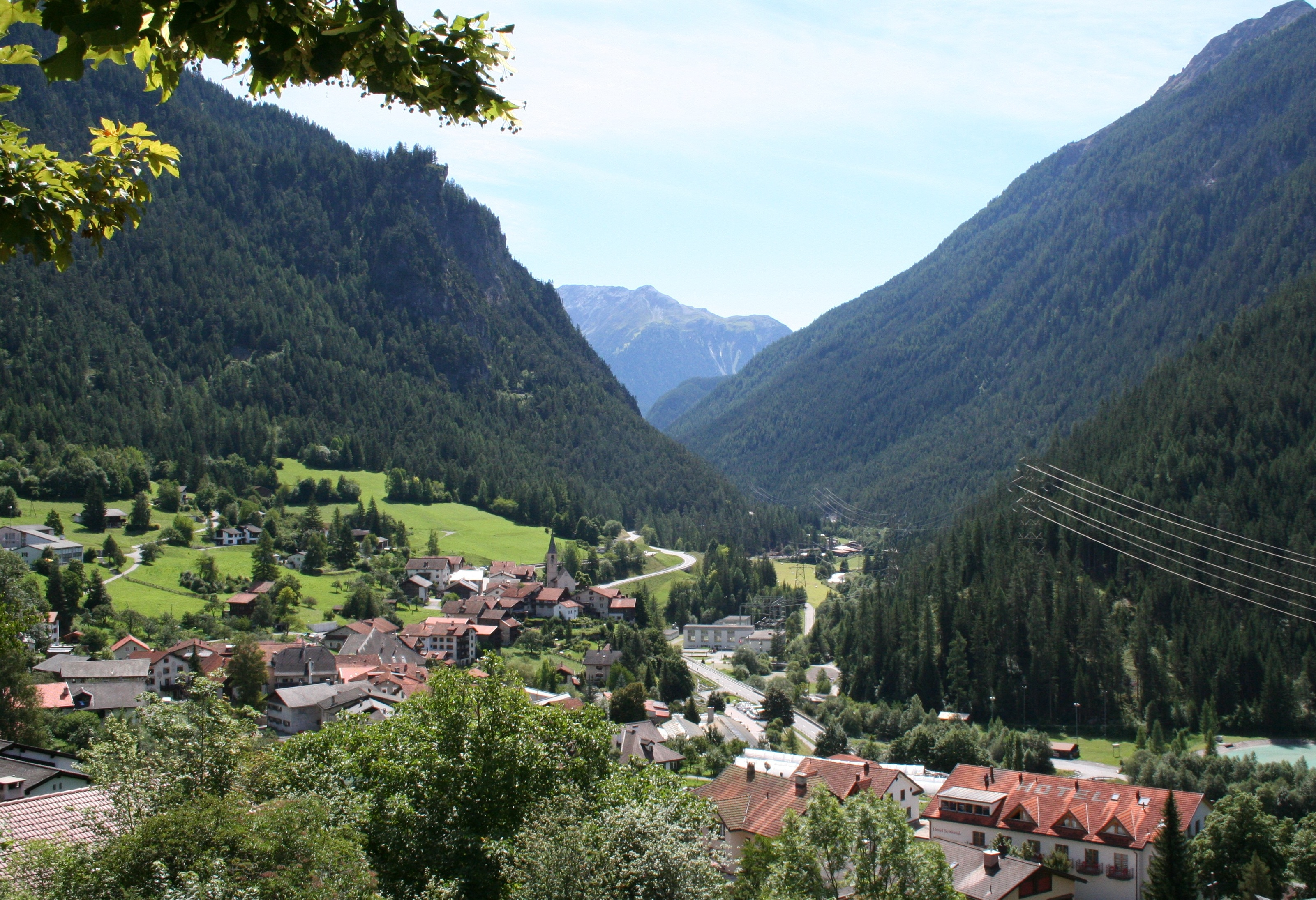 Filisur im Albulatal, Blick nach Südosten